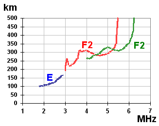 ionogramme